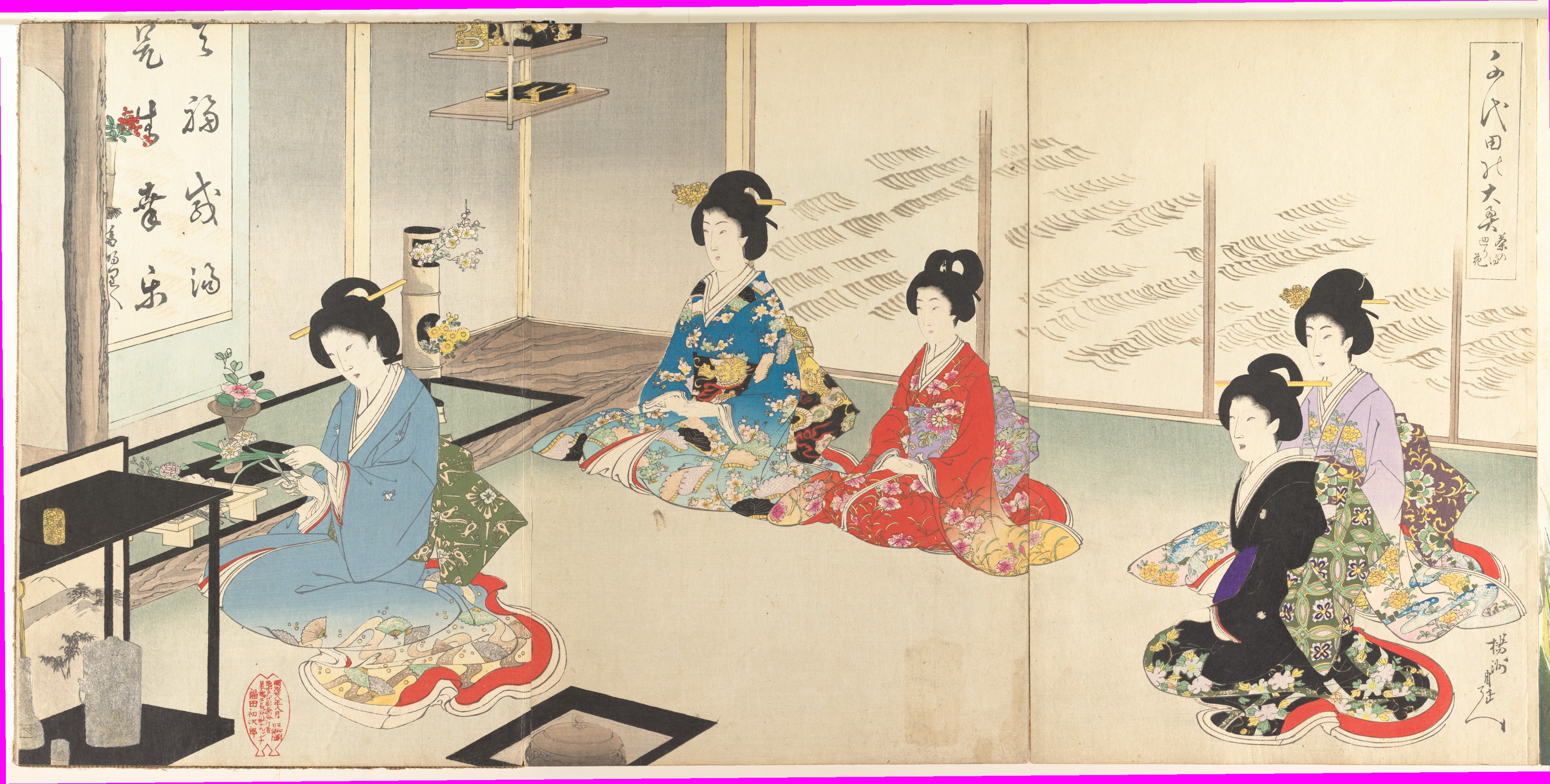 Japan; Print; Prints